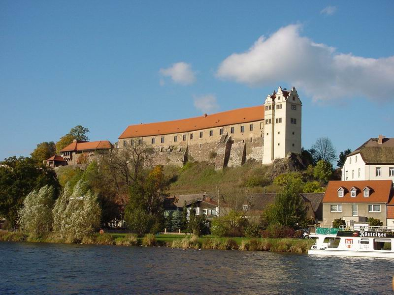 Wettin public domain eigenes Foto von 2004 Unterburg von Westen.